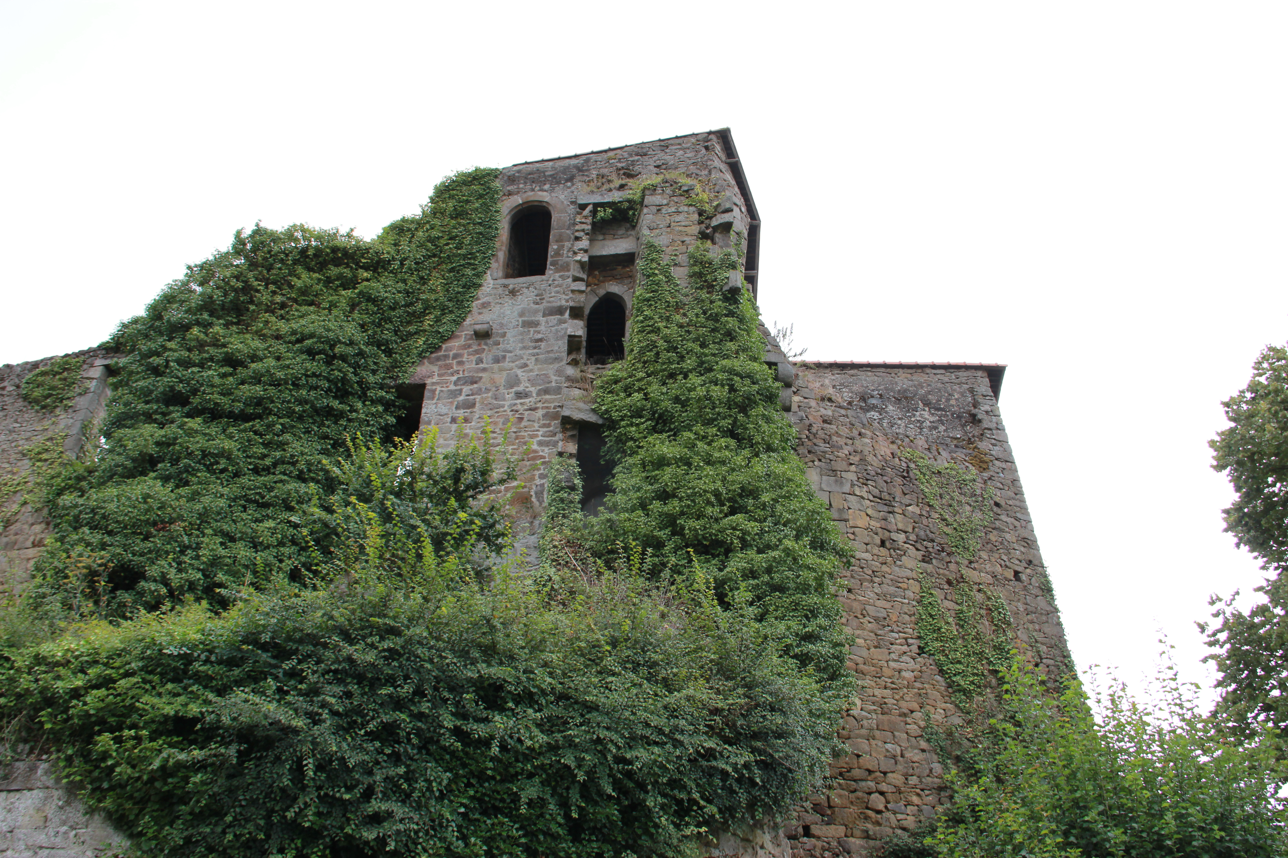 Les vestiges du château de Coëtquen XII-XIV-XVIIIème siècle. Demeure seigneuriale de Saint-Hélen. Un château qui a appartenu à l'illustre famille de Coëtquen (conseiller des Ducs de Bretagne puis des Rois de France). .